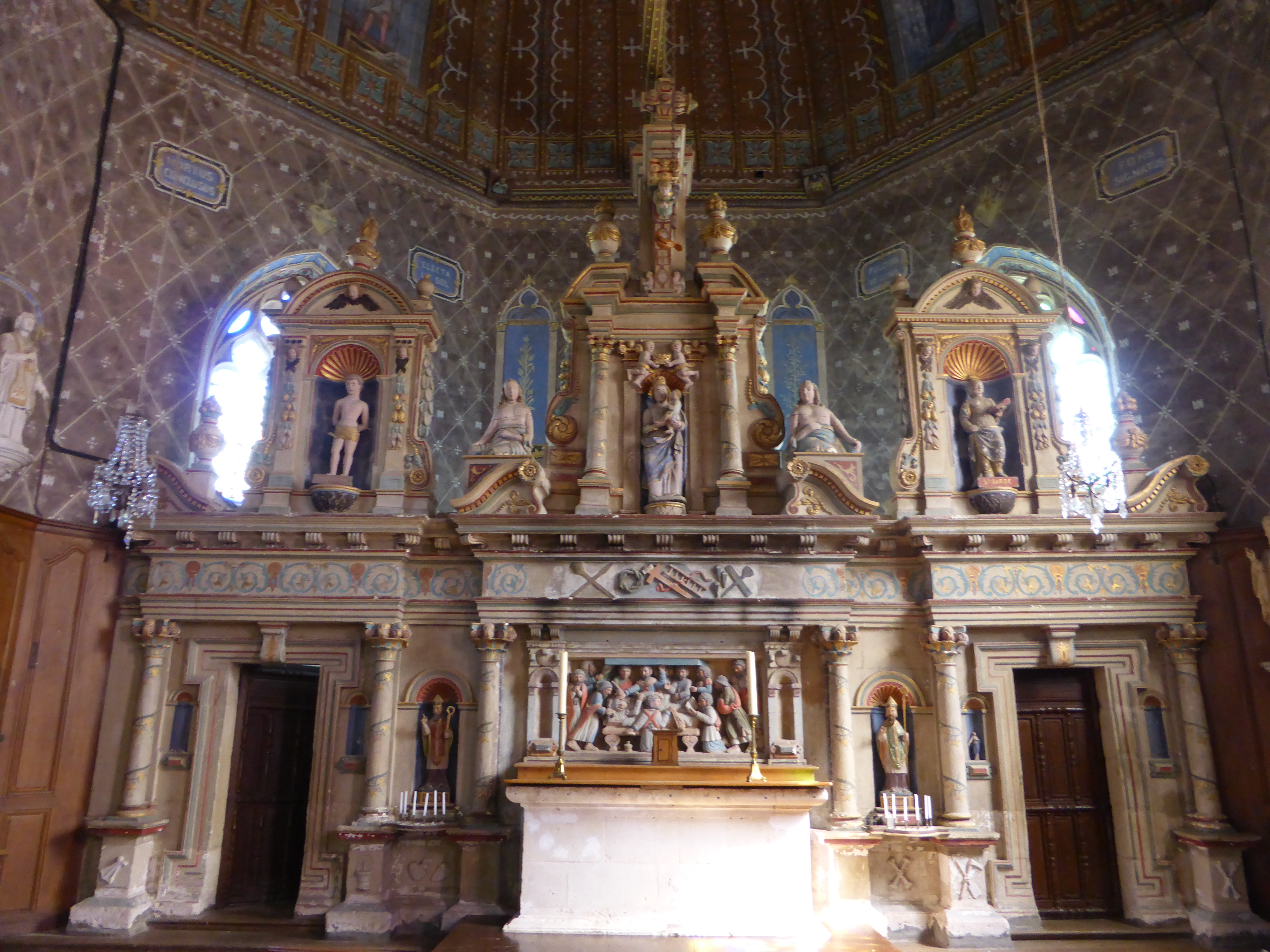 Maître-autel et chœur peint de l'église de Combres, en Eure-et-Loir.